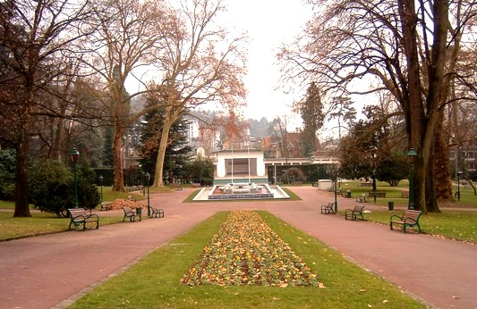 Parc floral des Thermes en centre ville d'Aix-les-Bains en France dans le département de la savoie. On voit en fond le parc ainsi que son théâtre de verdure et sa fontaine marocaine hommage aux négociations pour l'indépendance du Maroc qui eurent lieu à Aix-les-Bains.